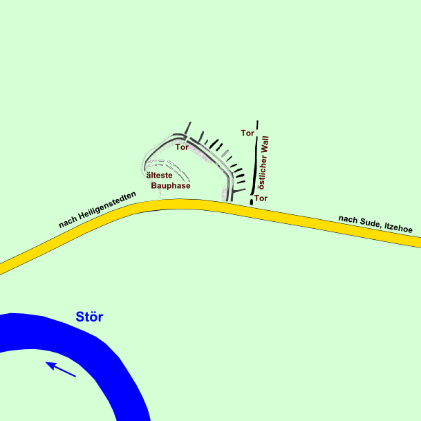 Karte Burg Esesfeld, Mittelalter